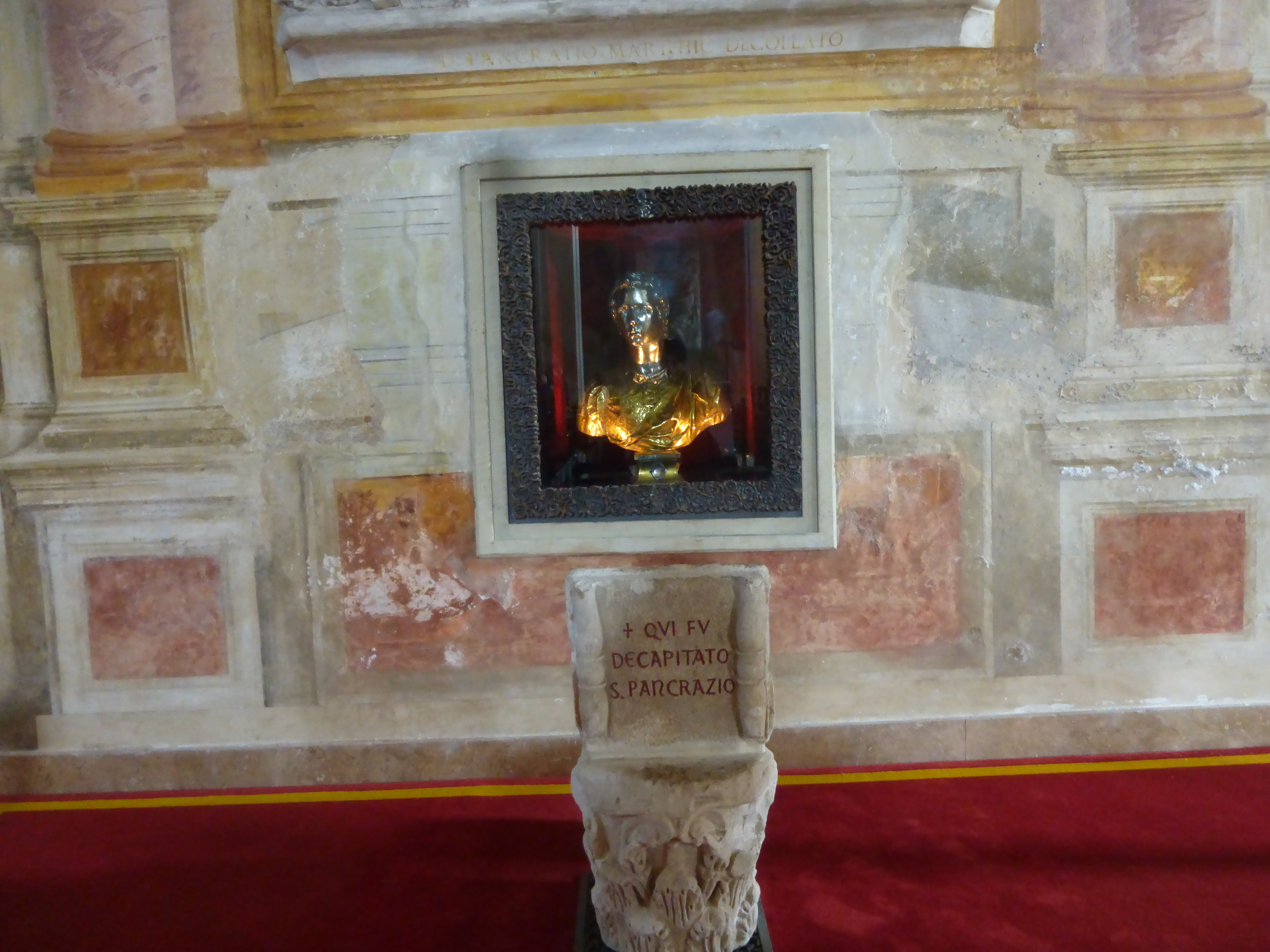 Roma, basilica s. Pancrazio. Memoriale del luogo di martirio di Pancrazio. Reliquiario della testa.